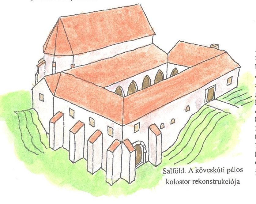 A salföldi pálos kolostor egykori képe